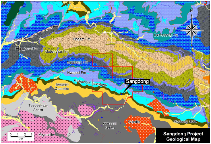 상동광산 인근지역 지질도